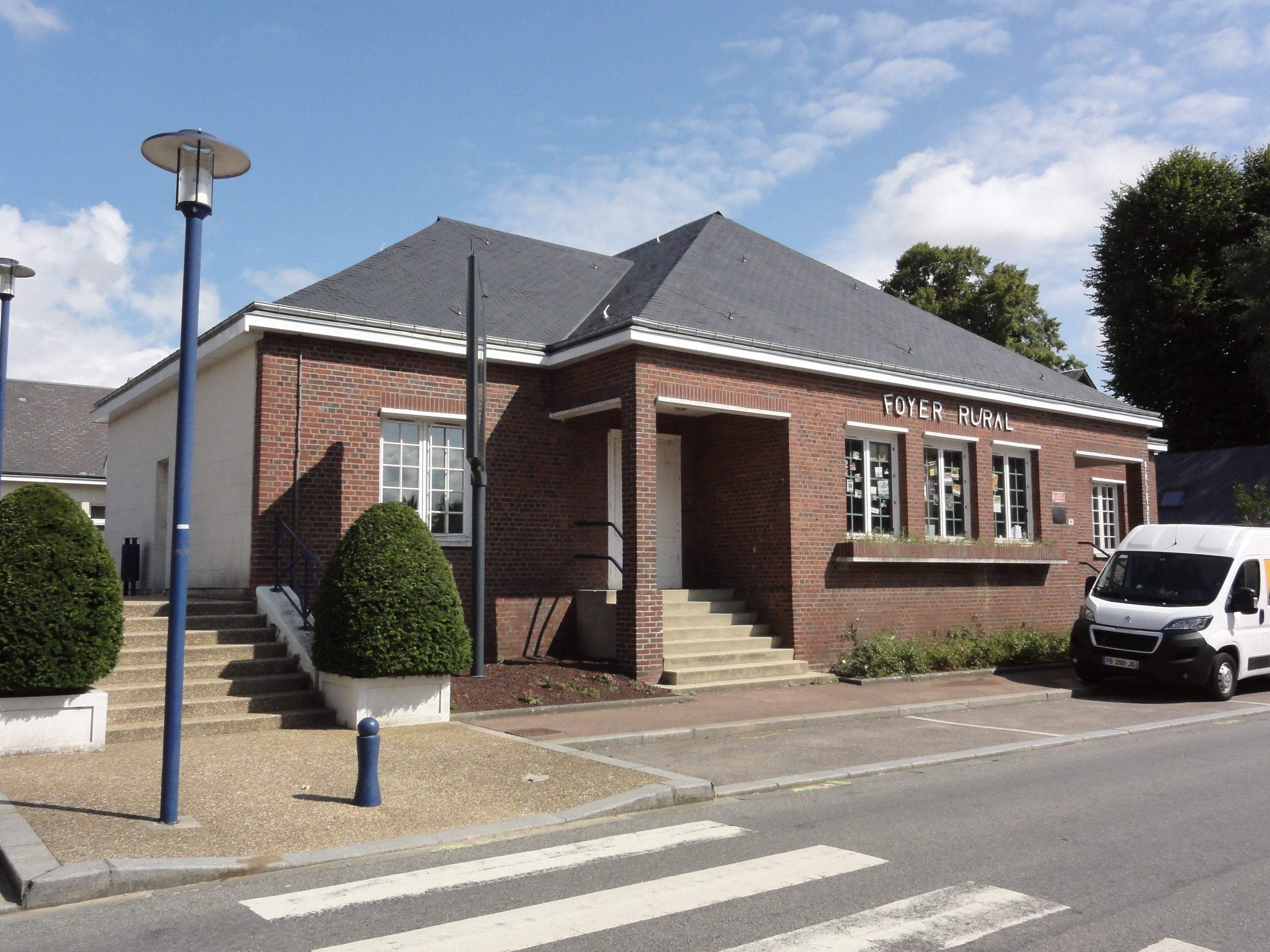 Limésy (Seine-Mar.) foyer rural